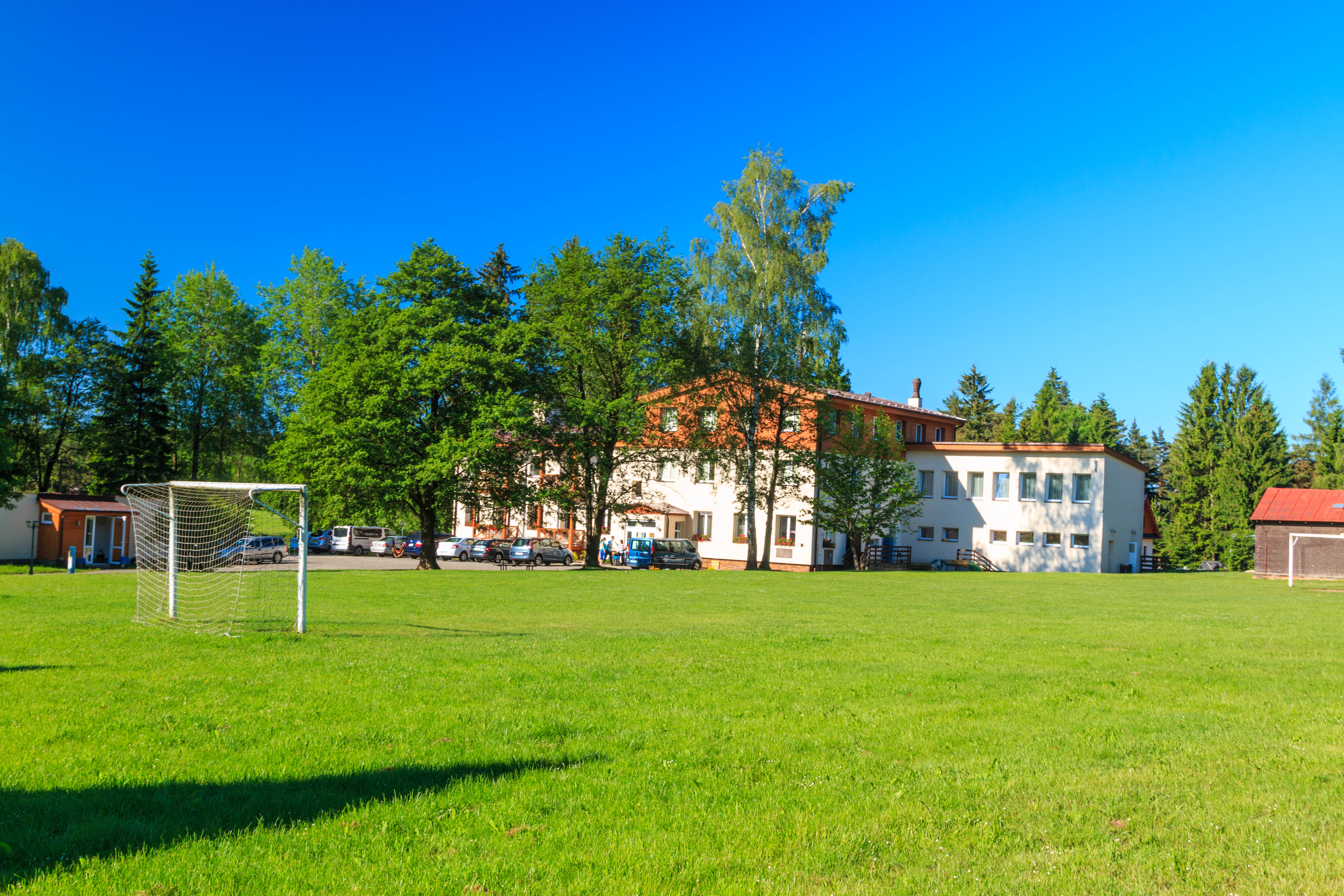 Dlouhý rekreační středisko Imanuel